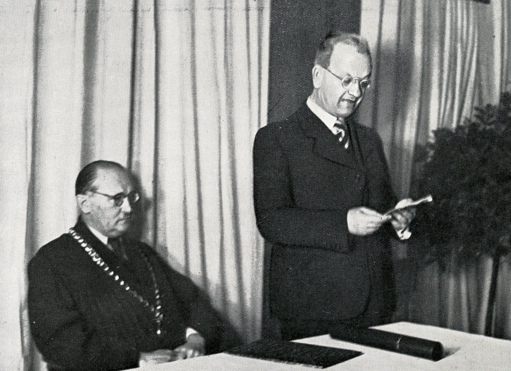 Promoce na Husově bohoslovecké fakultě, vlevo děkan HBF J. Kovář, vpravo synodní senior Josef Křenek